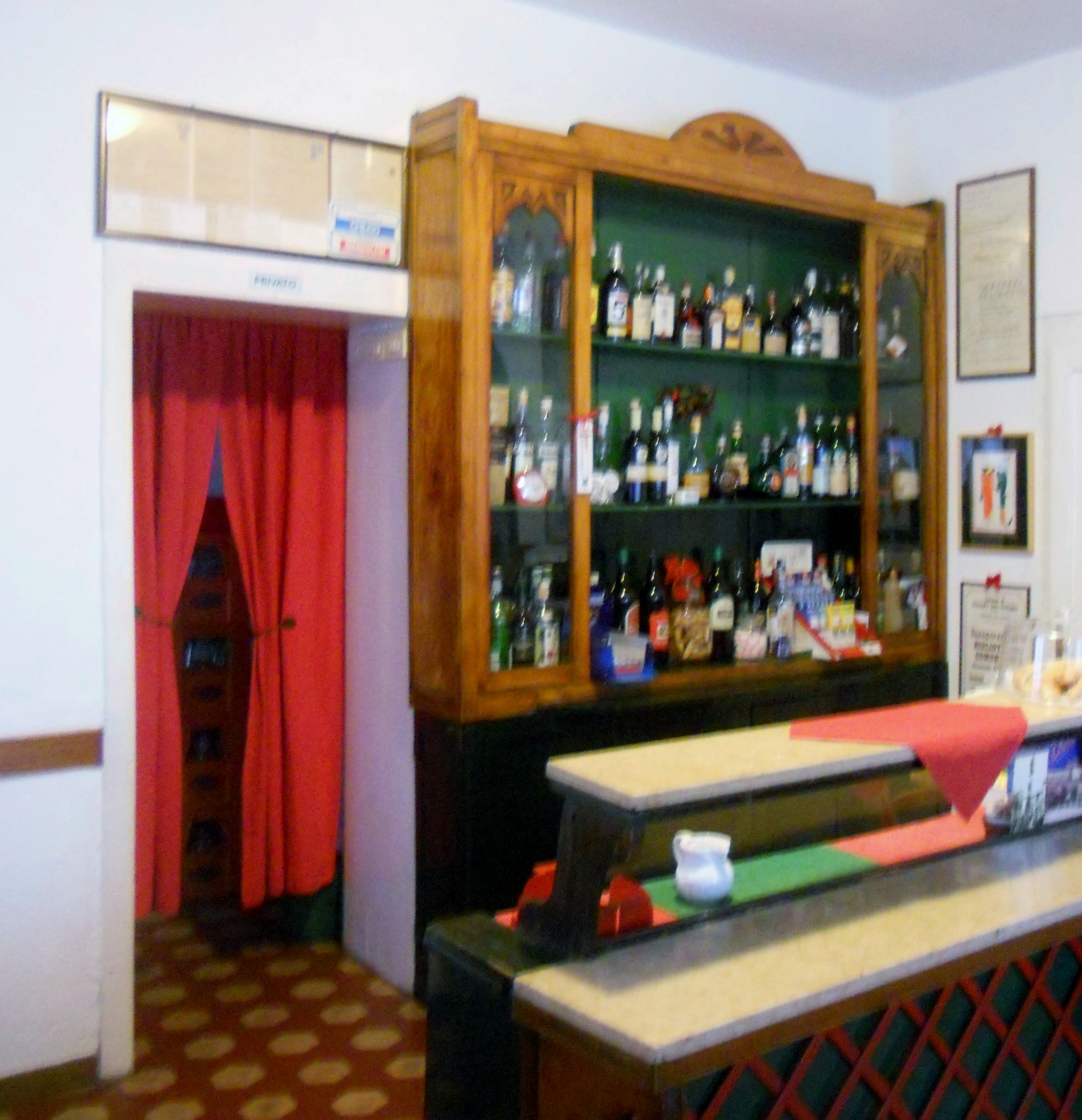 Bancone della locanda di Pillonetto.